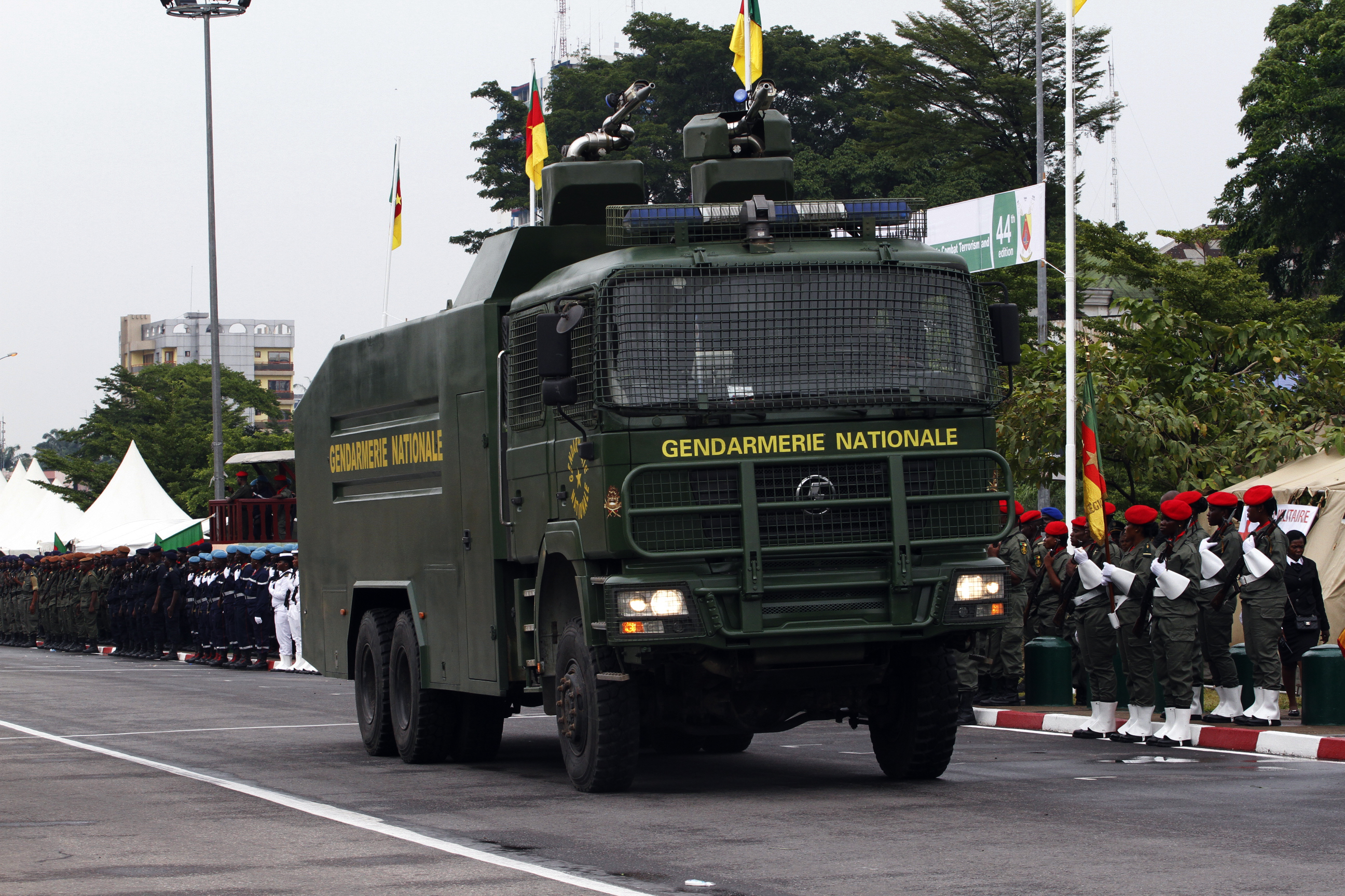 Camion anti émeute de la gendarmerie et de la police à Douala au Cameroun